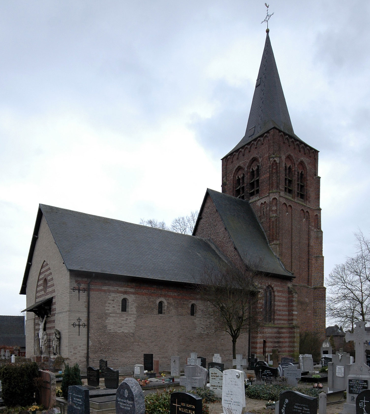 Oude Sint-Willibrordkerk, Waalre, NL